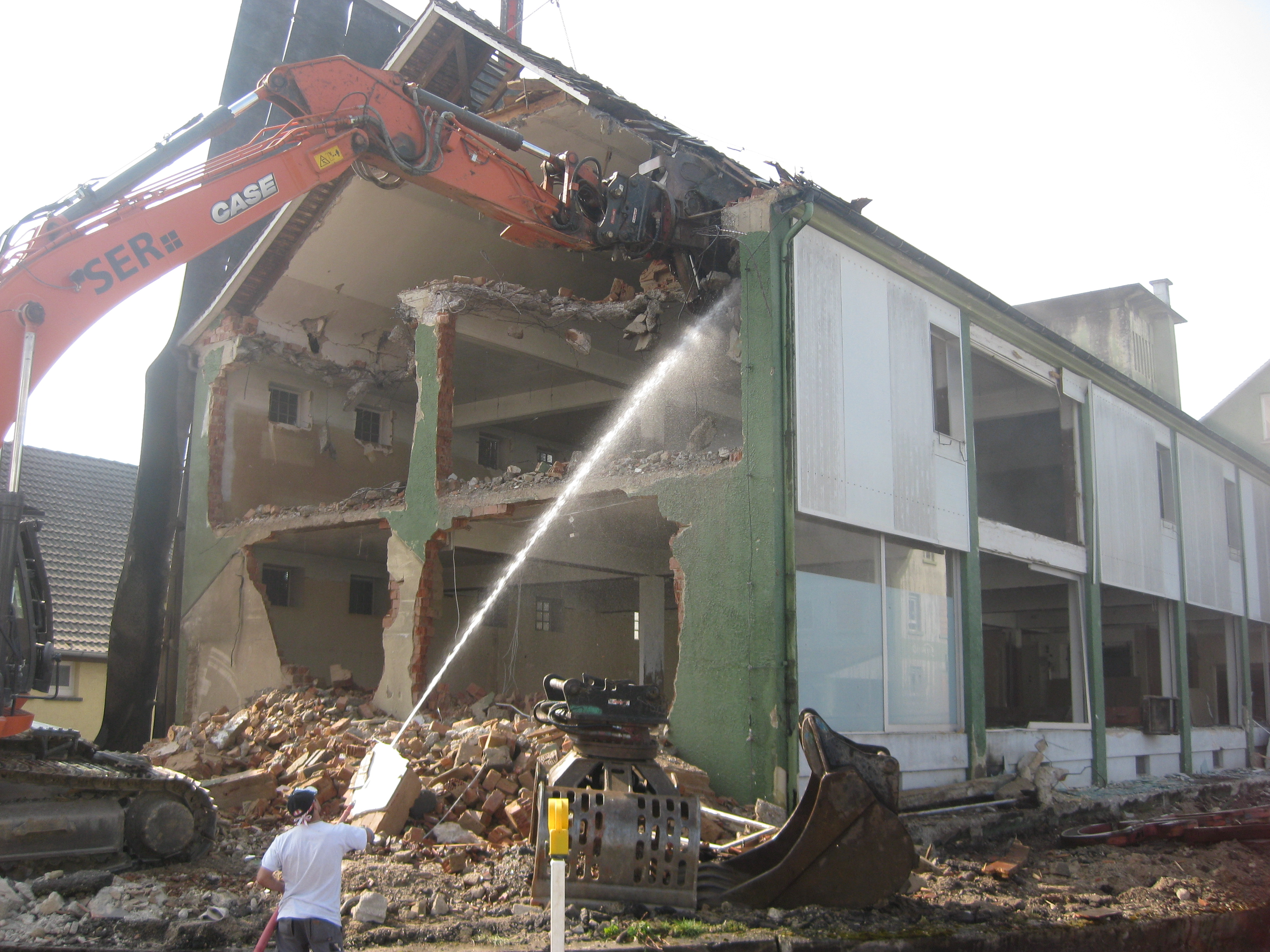 Abriss des Möbelhauses am Marktplatz in Eschelbronn